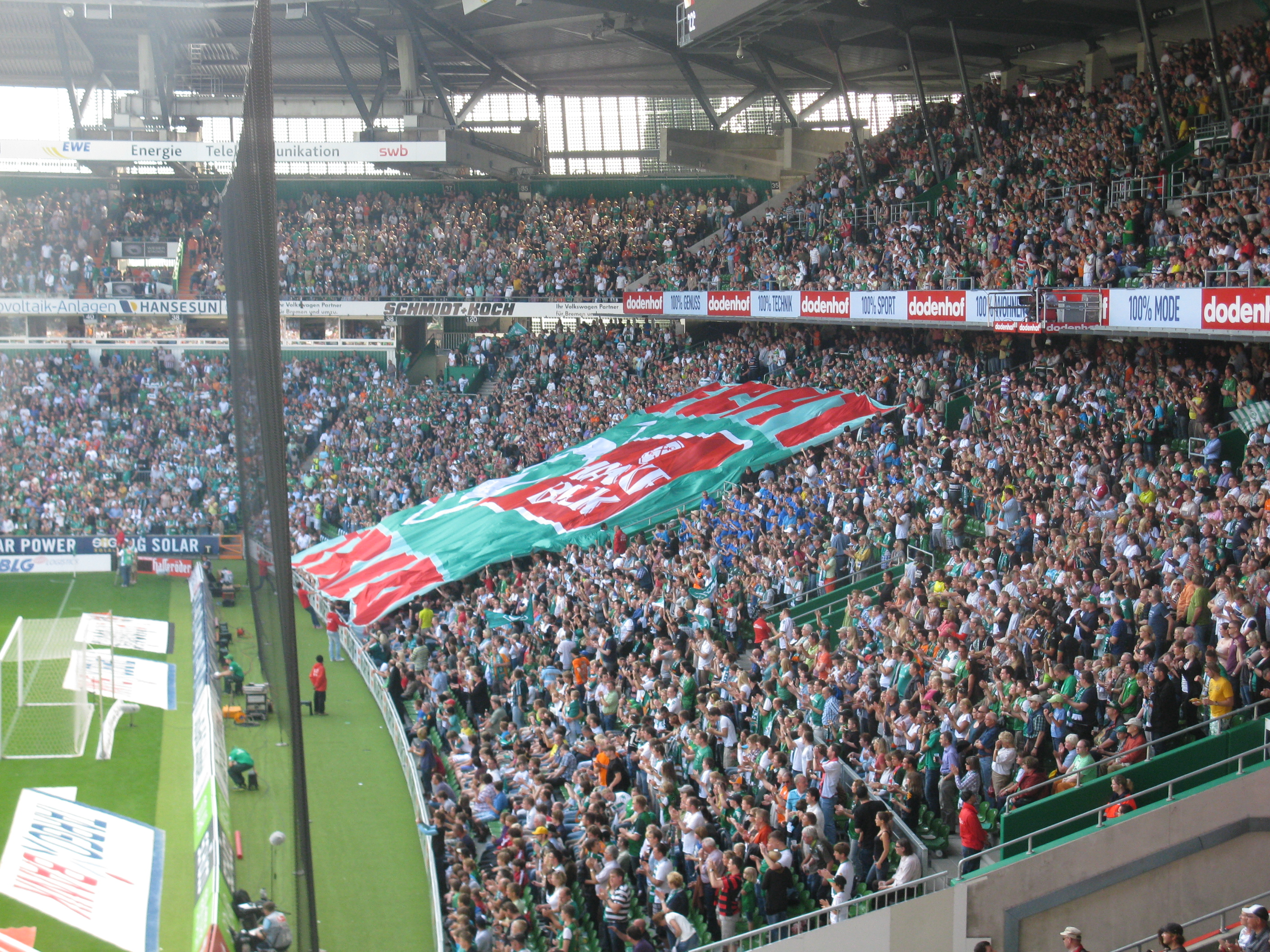 Die Westkurve des umgebauten Weserstadions. Falsch betitelt!